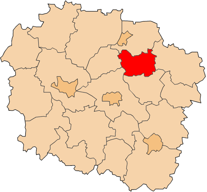 Powiat wąbrzeski na mapie województwa kujawsko-pomorskiego.